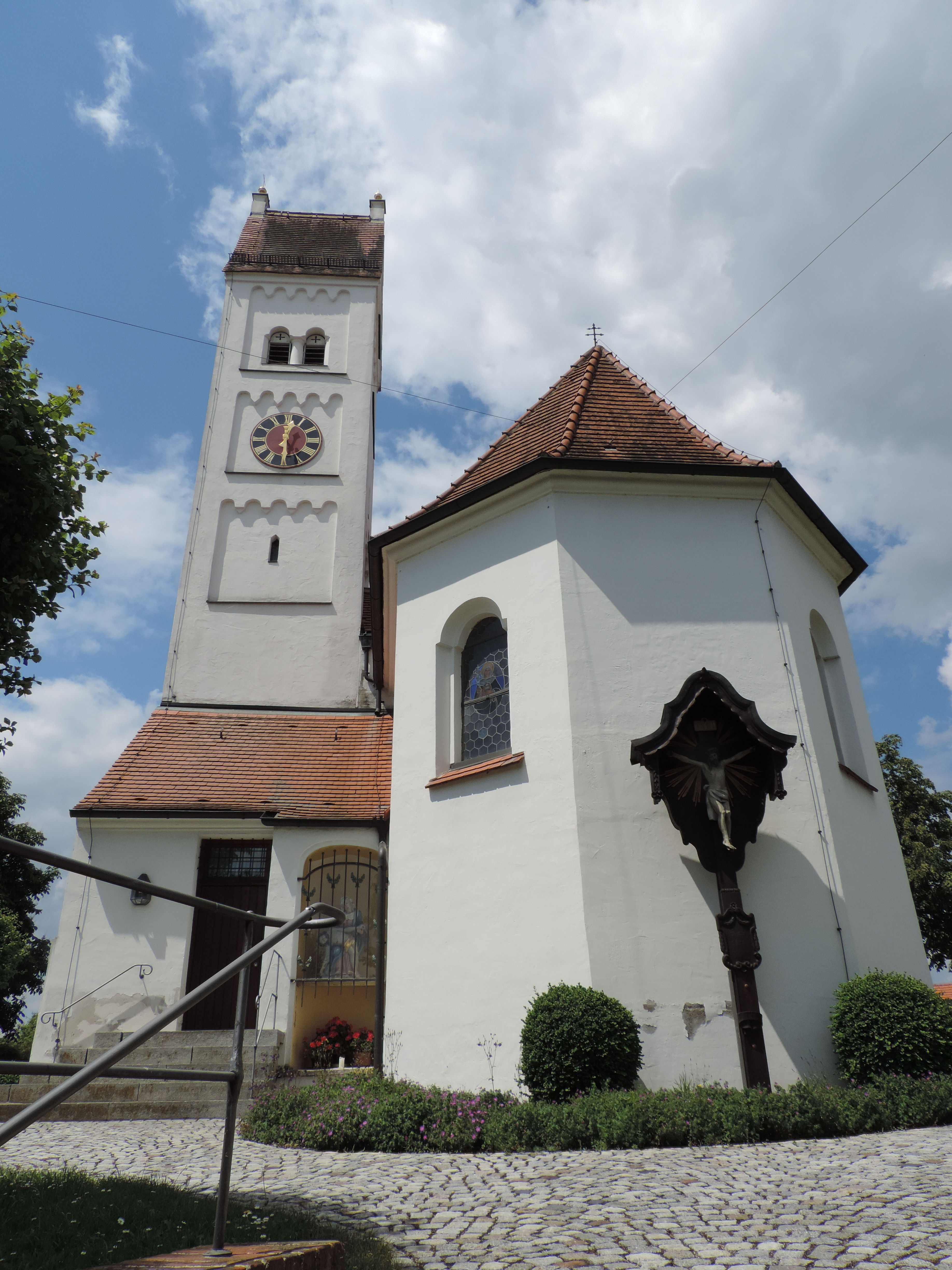 Westansicht